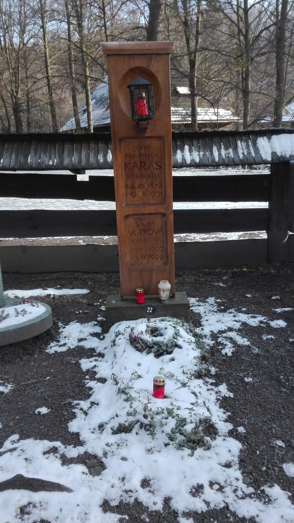 Hrob Vilmy Volkové a spisovatele Karase v Rožnově p. Radhoštěm (Valašský Slavín)